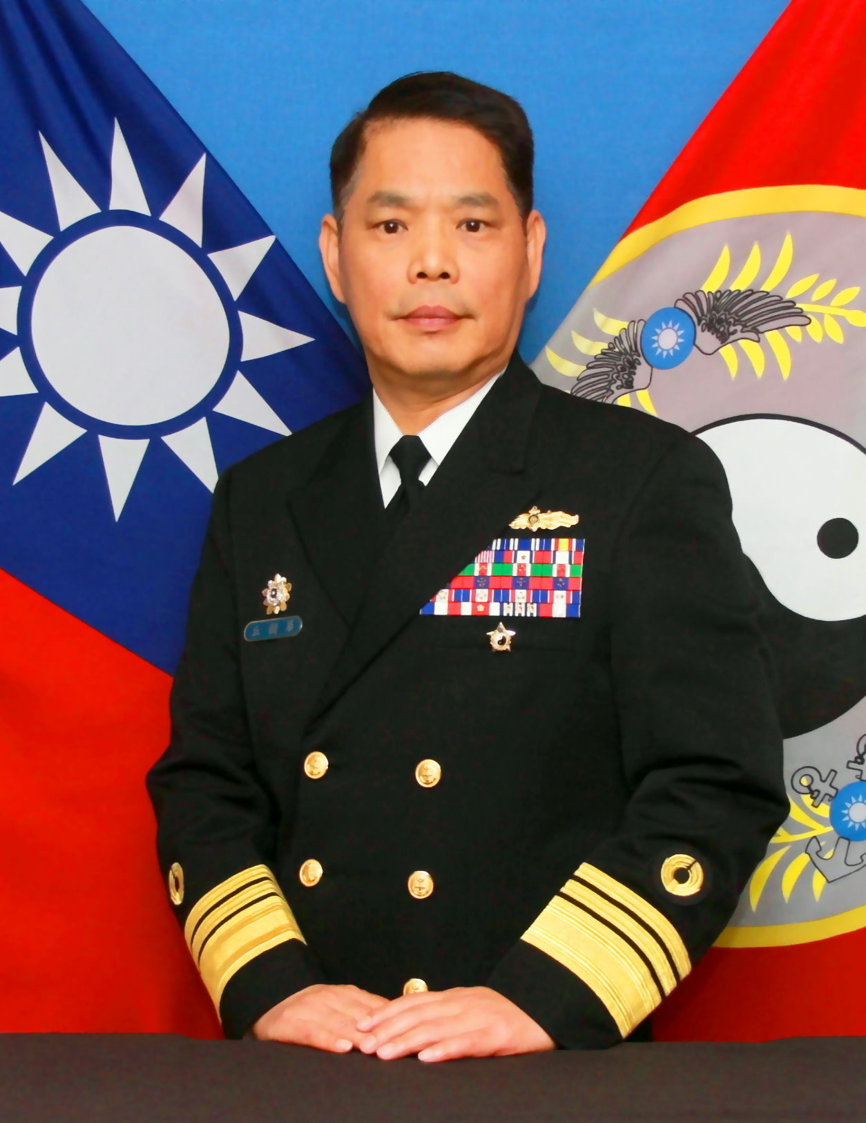 海軍第一副司令丘樹華中將